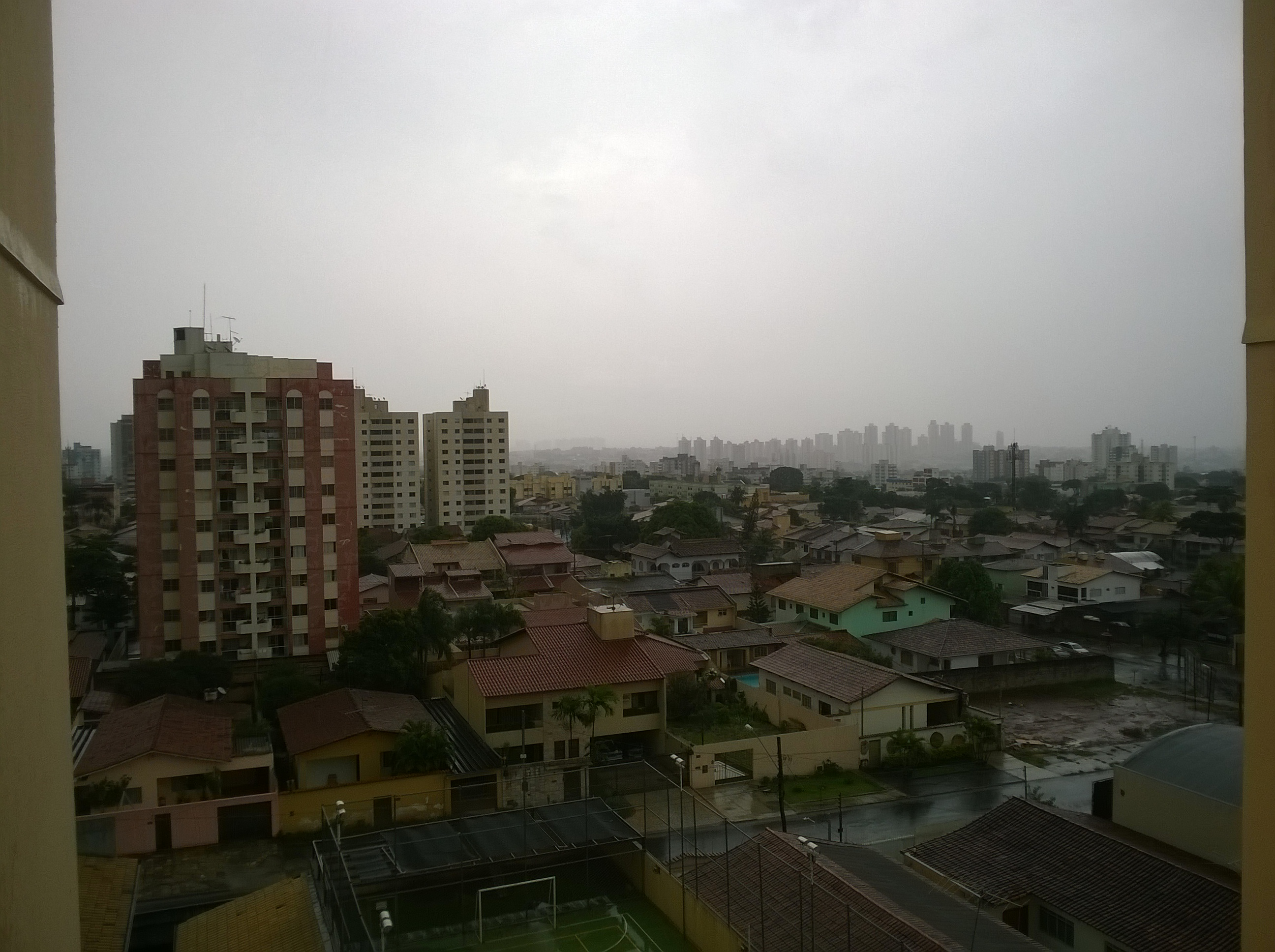 Vista do bairro Nova Suíça, em Goiânia, Goiás.